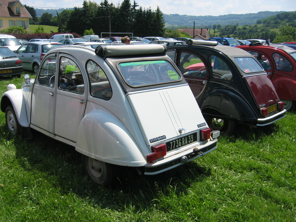 Citroen 2CV